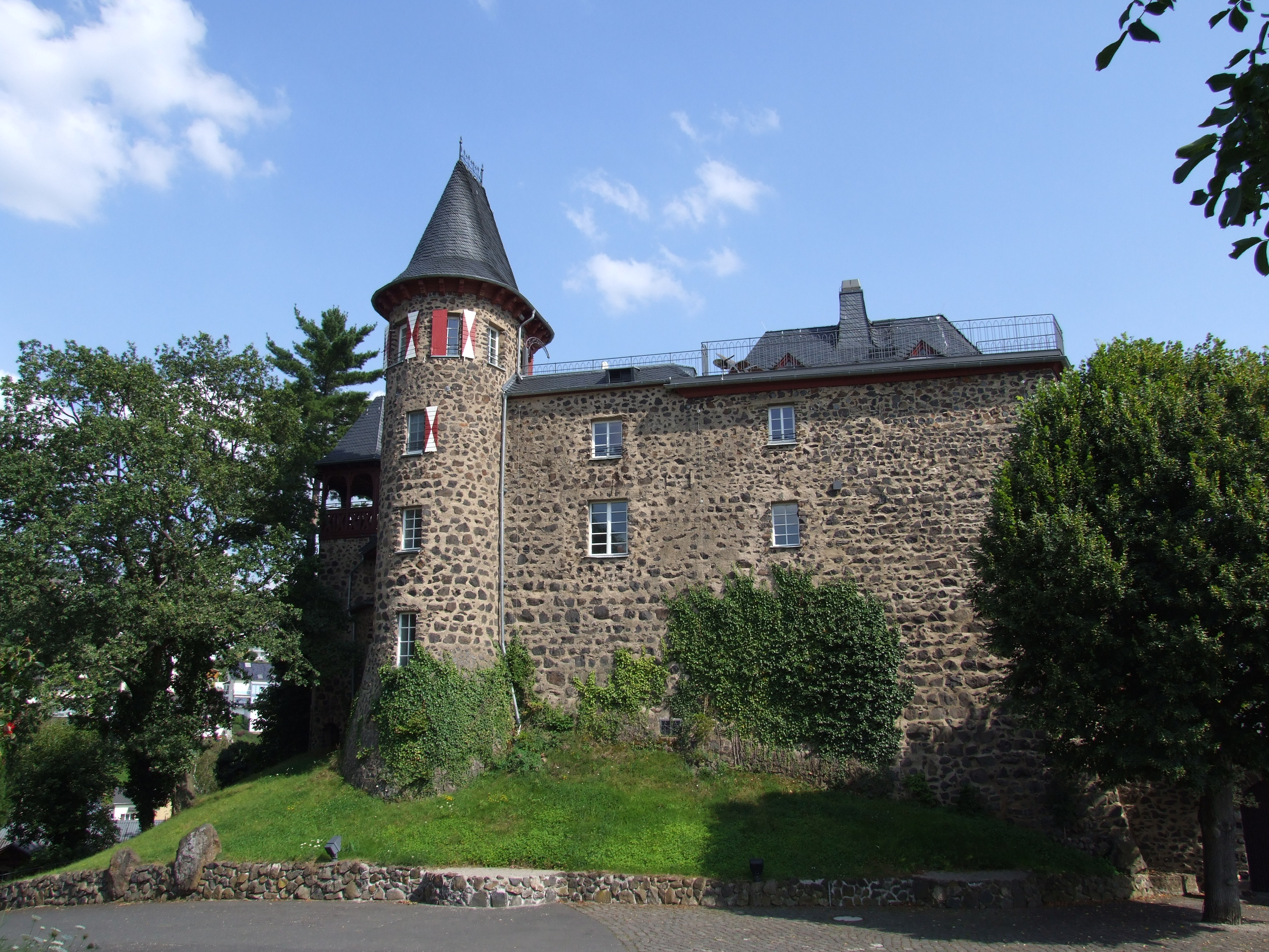 Burg Ockenfels